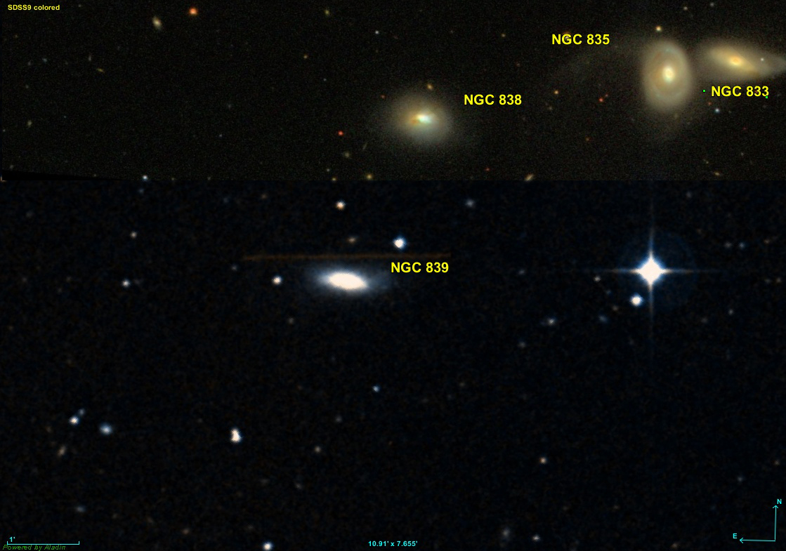 Image créée à l'aide du logiciel Aladin Sky Atlas du Centre de Données astronomiques de Strasbourg et des données fusionnées de DSS (Digitized Sky Survey) et de SDSS (Sloan Digital Sky Survey)